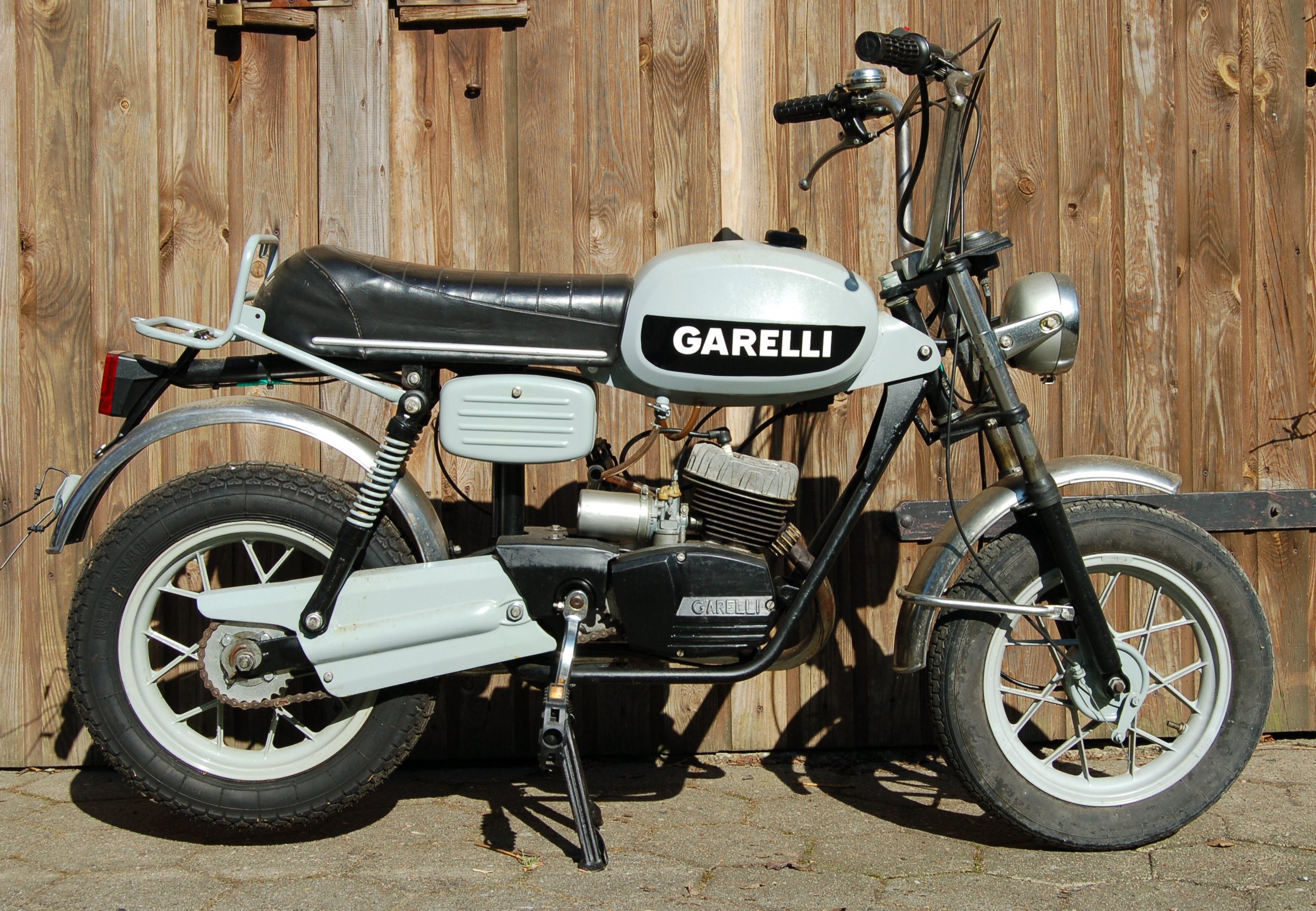 Garelli 25 S, Baujahr 1978